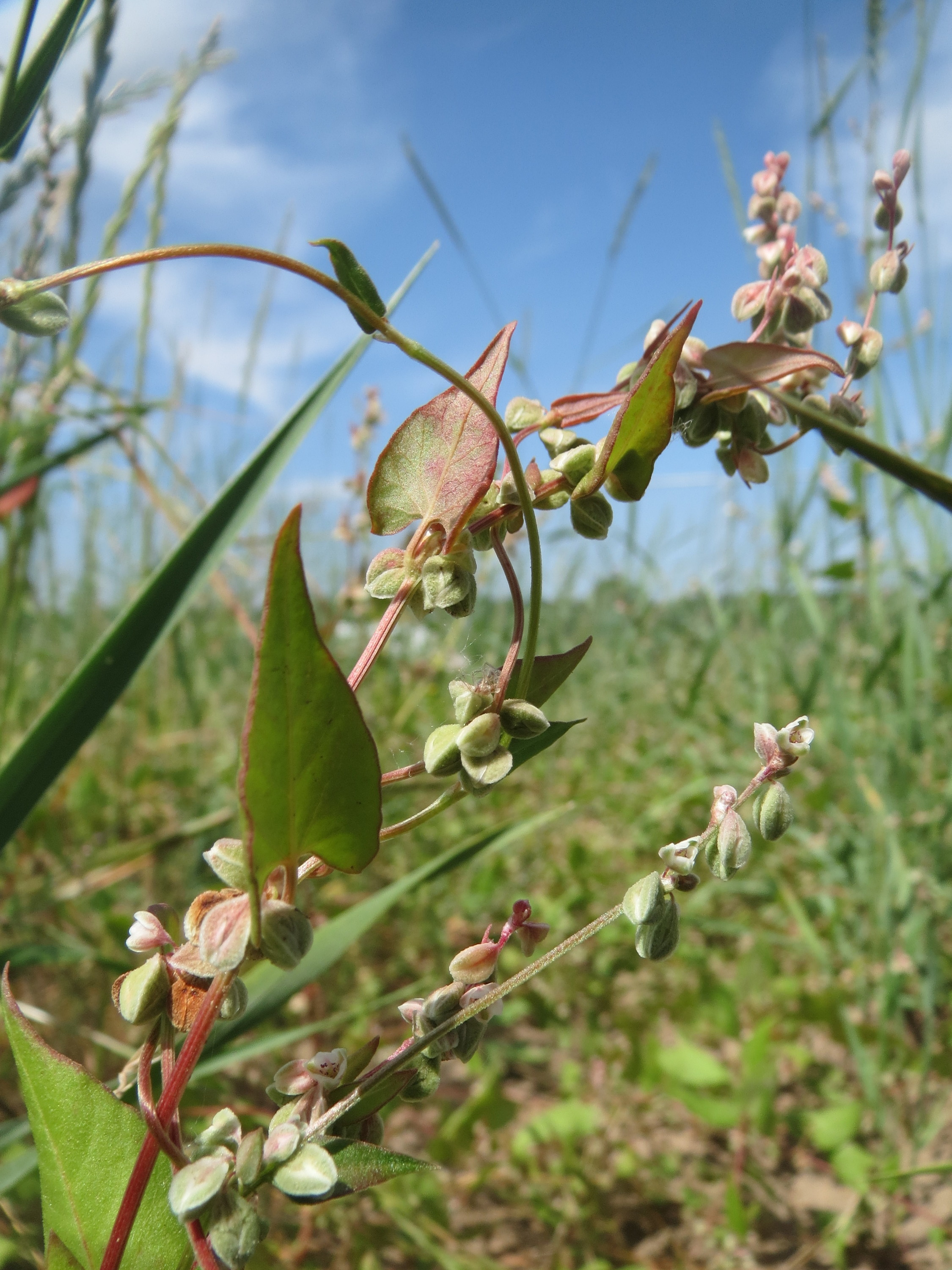 Windenknöterich (Fallopia convolvulus) auf einer Wiese zum Schutz der Haubenlerche beim Dänischen Lager bei Hockenheim